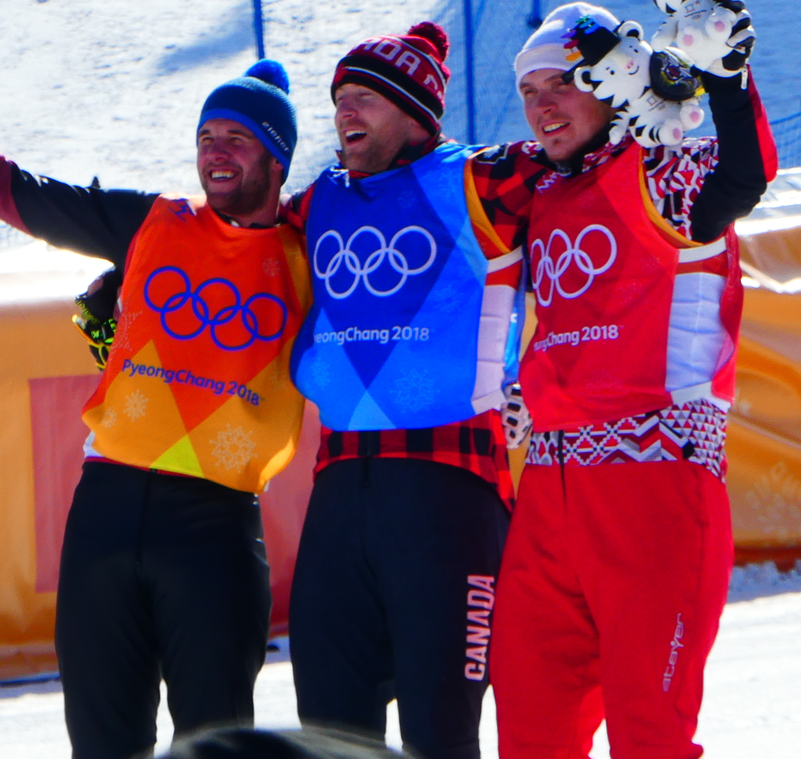 Phoenix snow park, site du ski cross Podium